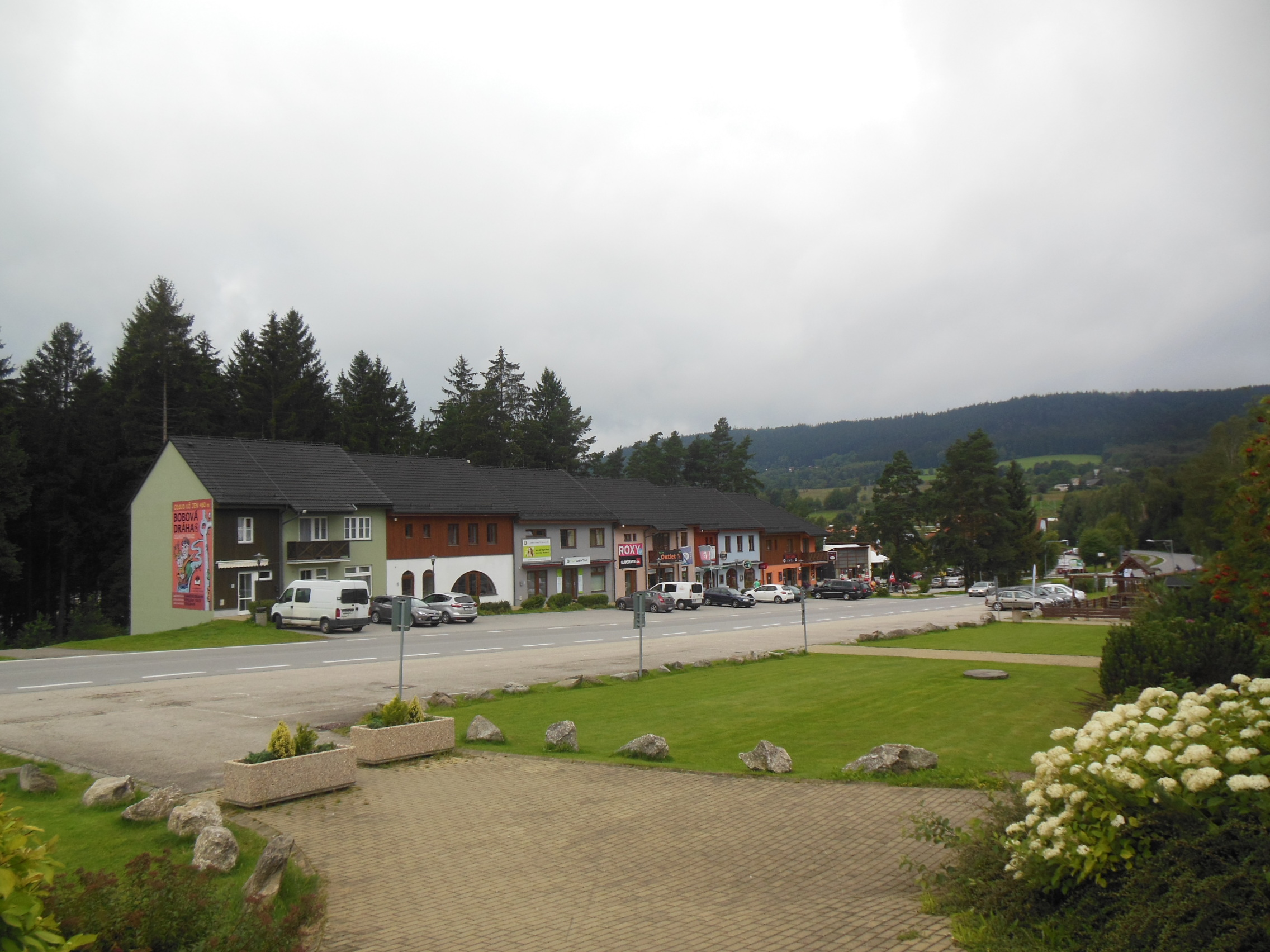 Lipno nad Vltavou (okres Český Krumlov). Pohled od Obecního úřadu k č. p. 119-124.